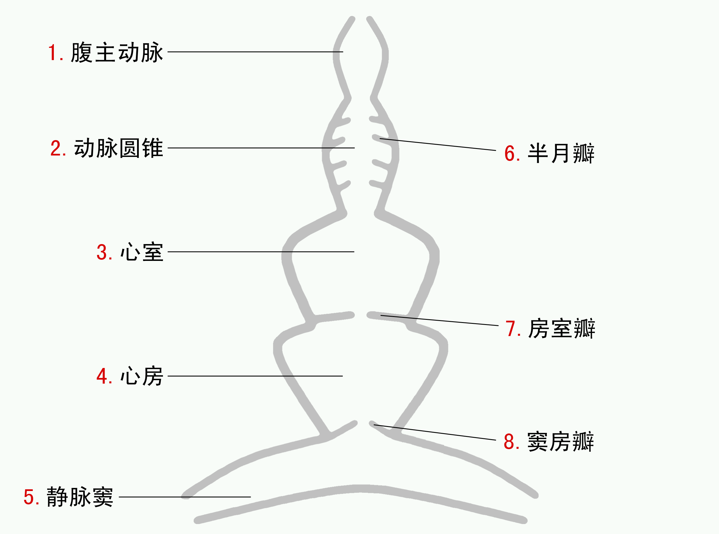 从File:Hypothetisches herz.jpg重新制图